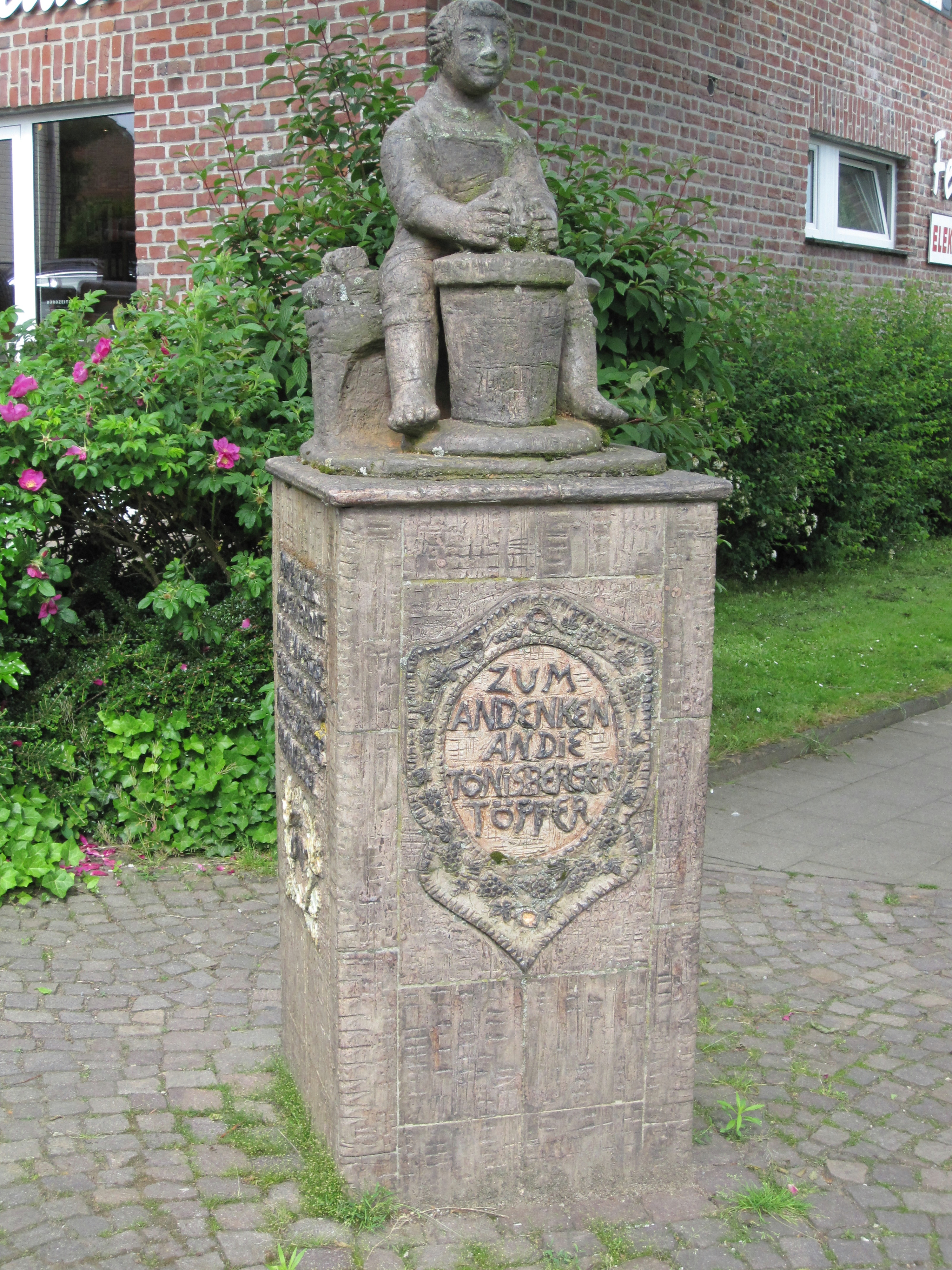 Töpferdenkmal von Anneliese Langenbach in Kempen-Tönisberg